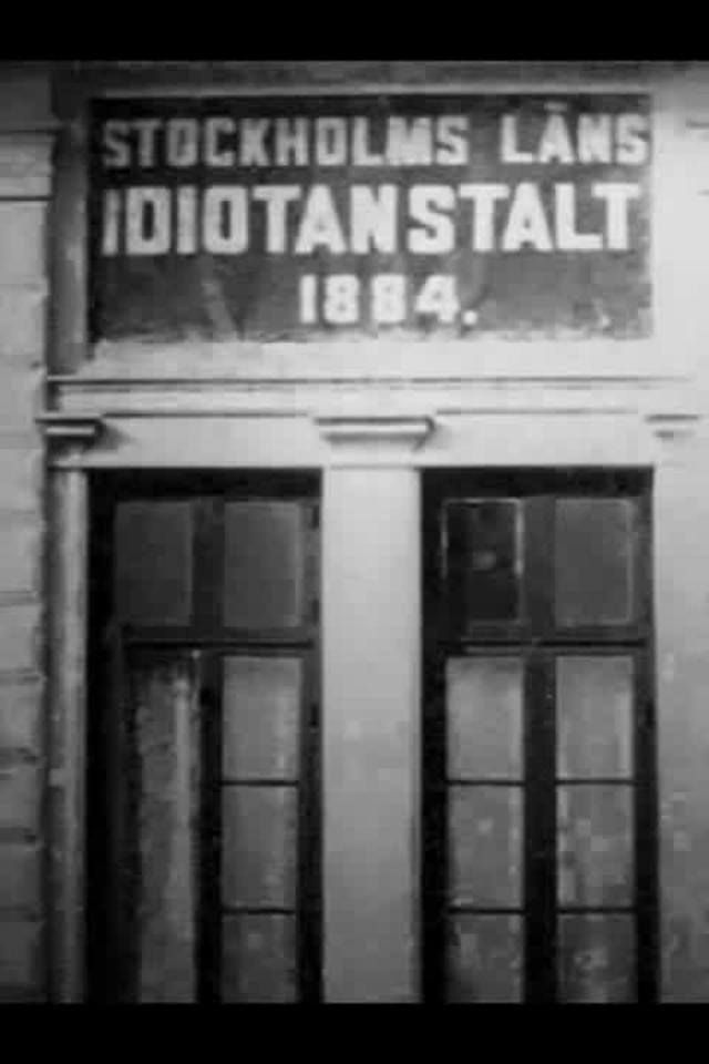 Huvudentrén för Stockholms läns idiotanstalt i Upplands Väsby.